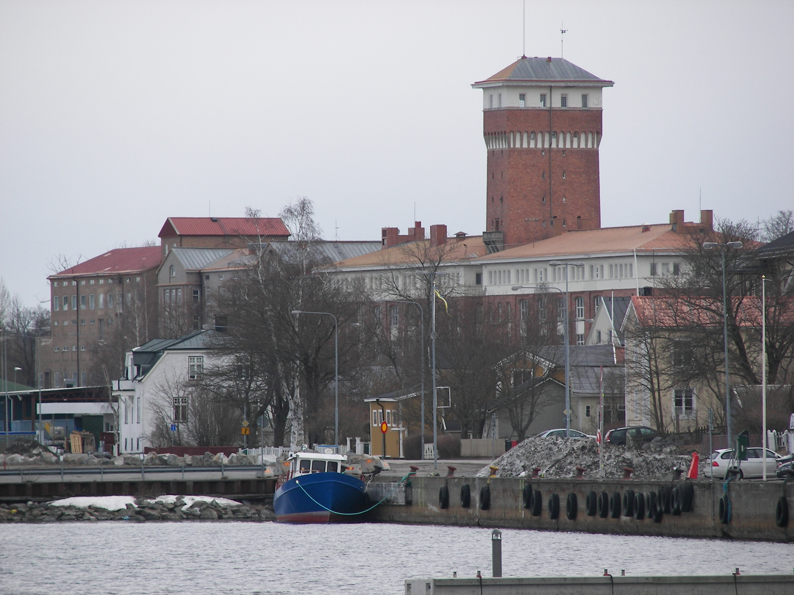 Härnösand Svarven 15. Tidigare Tobaksmonopolet. Byggdes 1906 som dotterbolag till Fabriksbolaget Ph. U Strengberg & Co i Jakobstad, Finland.